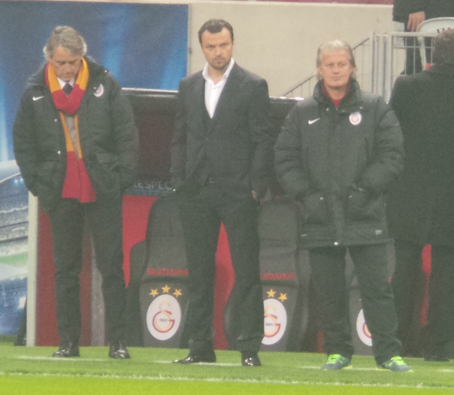 Mancini kurmayları Tomáš Ujfaluši ve Tugay Kerimoğlu ile